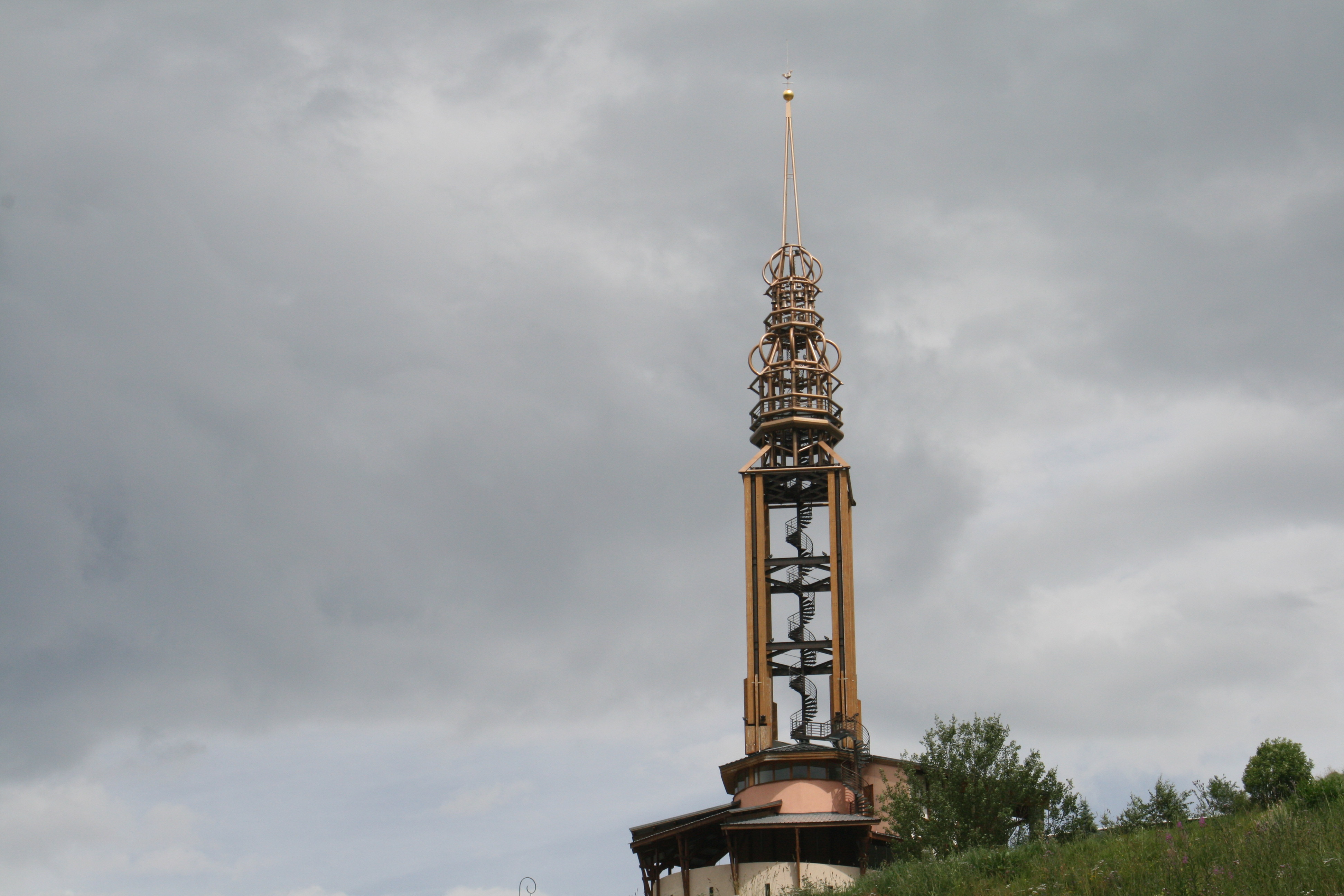 Clocher à bulbe aux Ménuires